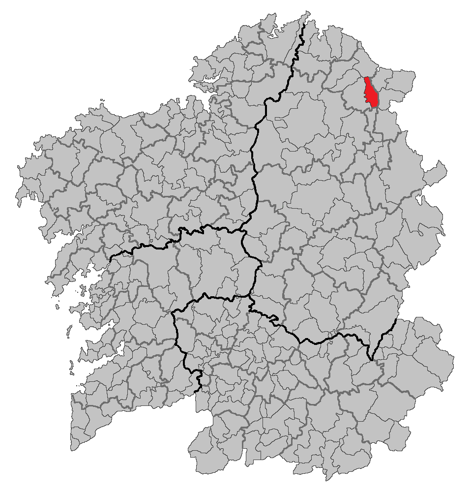 Mapa coa localización do concello de Lourenzá.